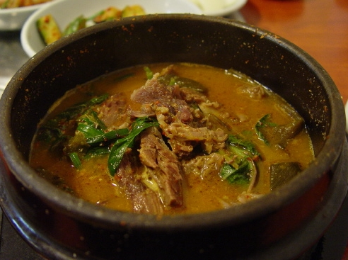 보신탕 개장국, 지양탕, 구장 등으로 불린다. 개고기를 푹 고아 삶아서 만튼 한국 고유의 국(탕). 흔히 여름철 보신용으로 또 더위가 심한 삼복(초복, 붕복, 말복)에 먹는 풍습이 오래전부터 전해져 내려온다.